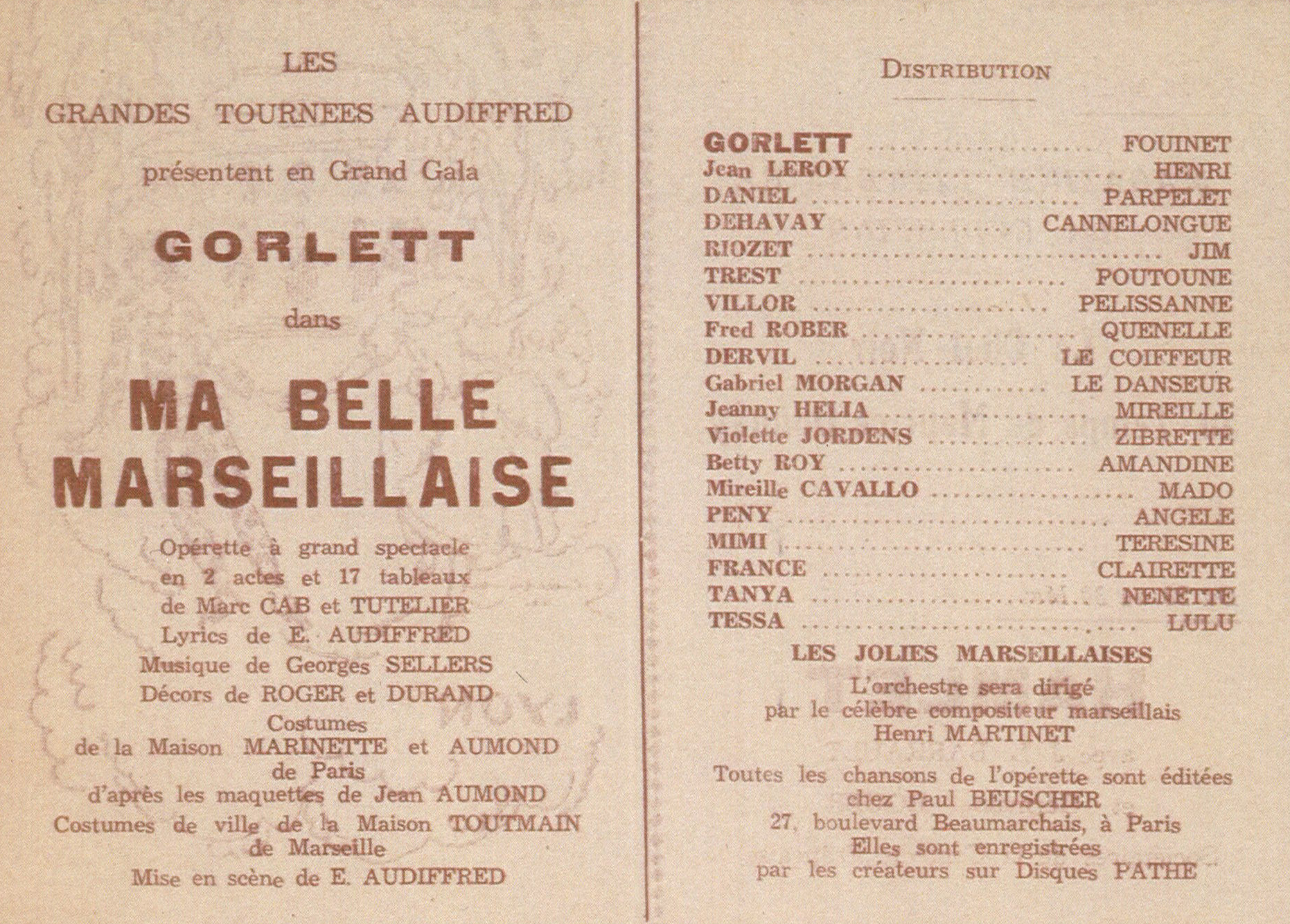 spectacle Audiffred